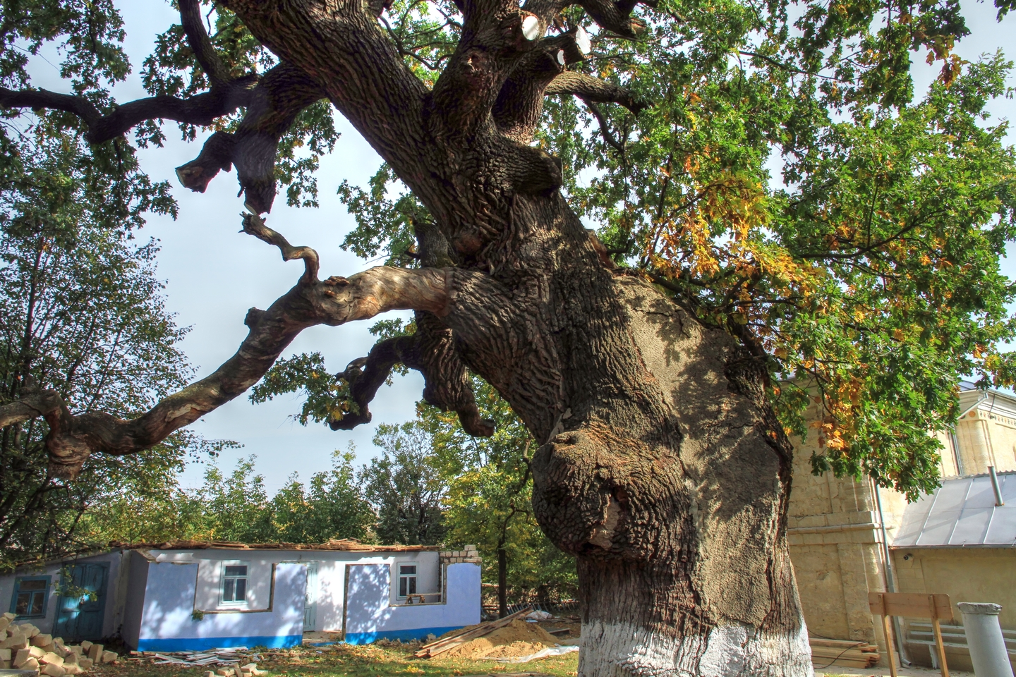 Дуб черешчатый «Штефан чел Маре», монумент природы, находится в Шолдэнештский район, с. Кобыля (код MD-SD-mn.Cb-103) Cb-103